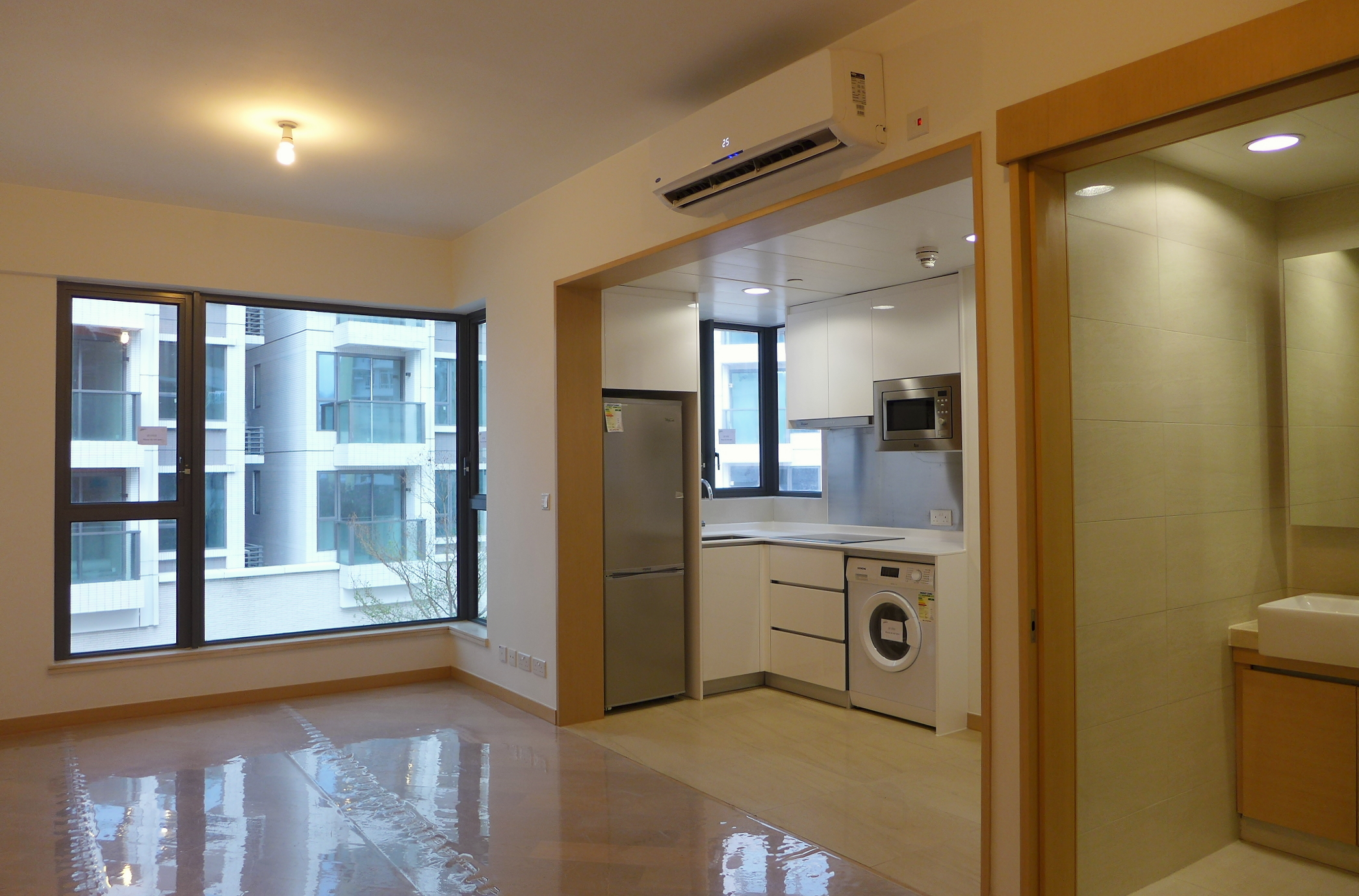 De Novo Open Studio flat